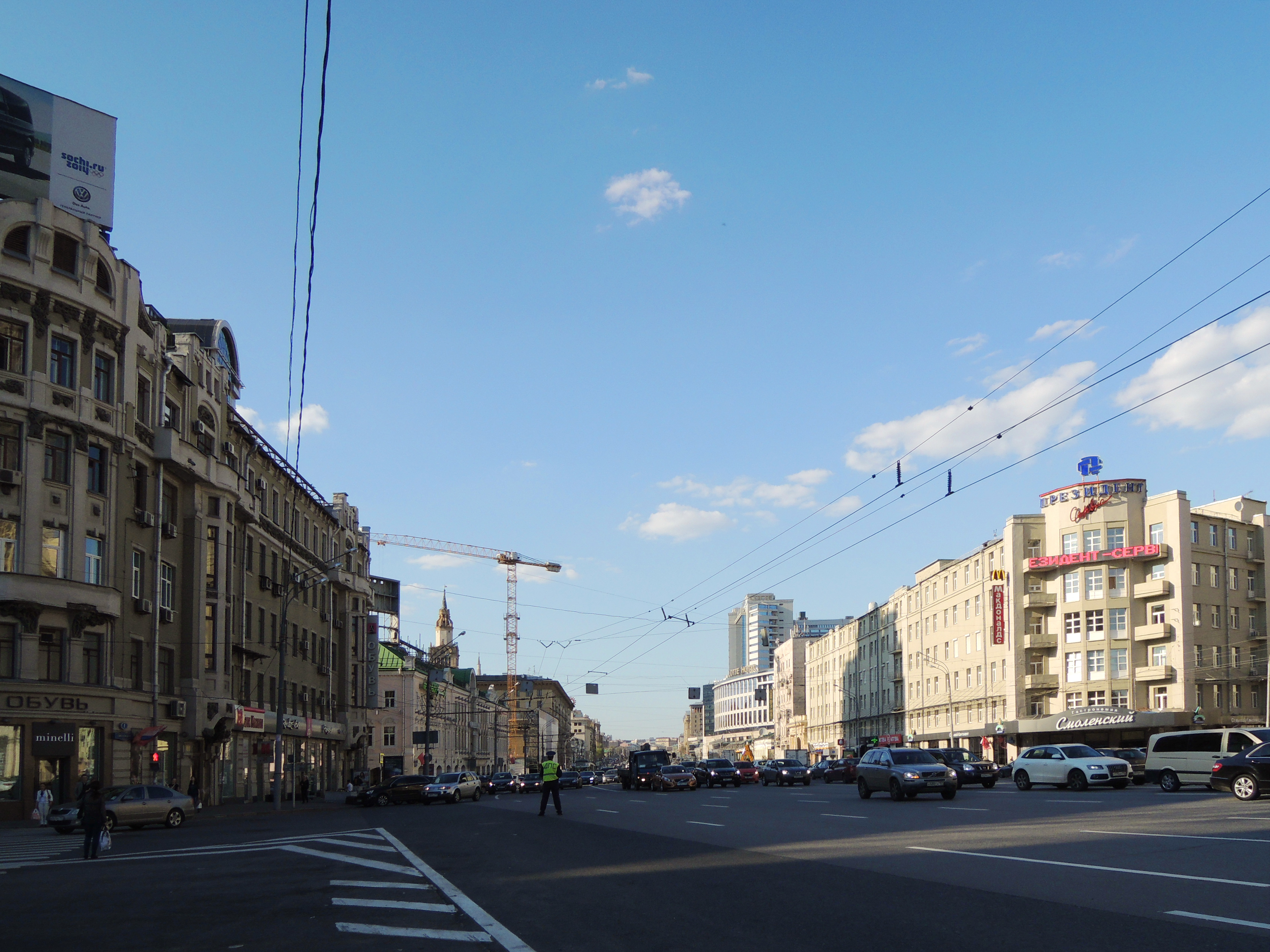 Смоленская площадь